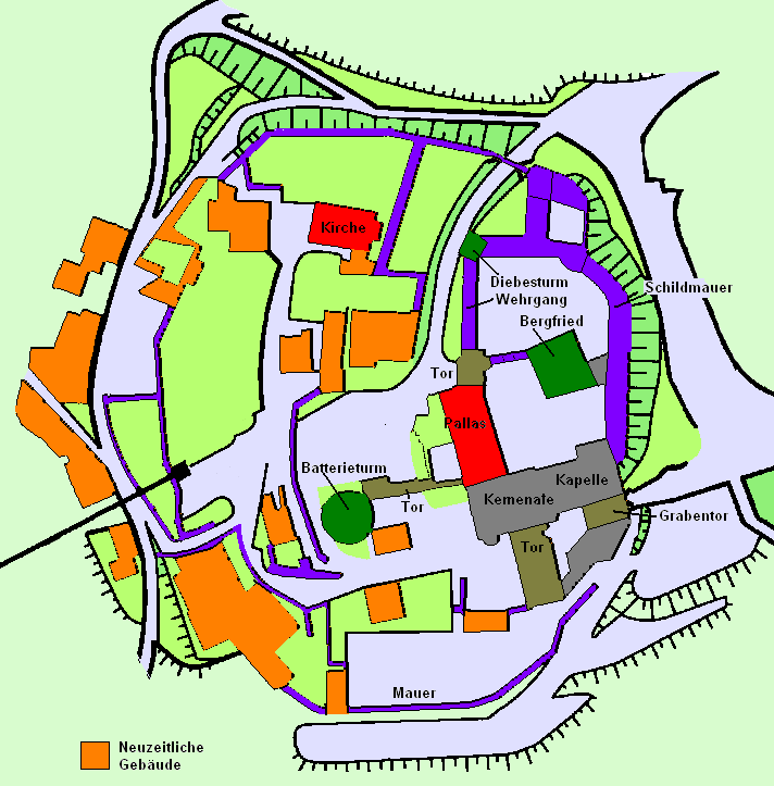 Grundriss von Schloss Burg